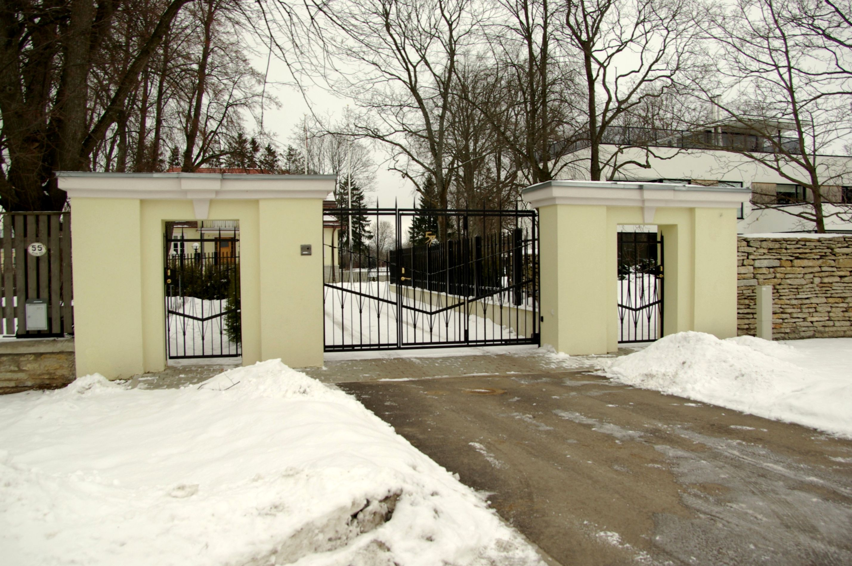 Jääb Kose tee ja Vabaõhukooli tee ristumiskoha juurde Tallinnas